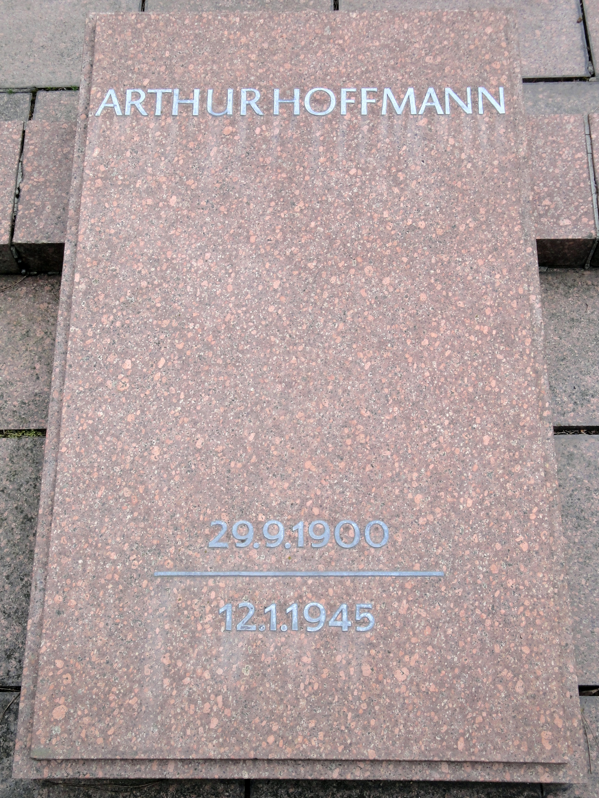 Grab von Arthur Hoffmann auf dem Südfriedhof in Leipzig